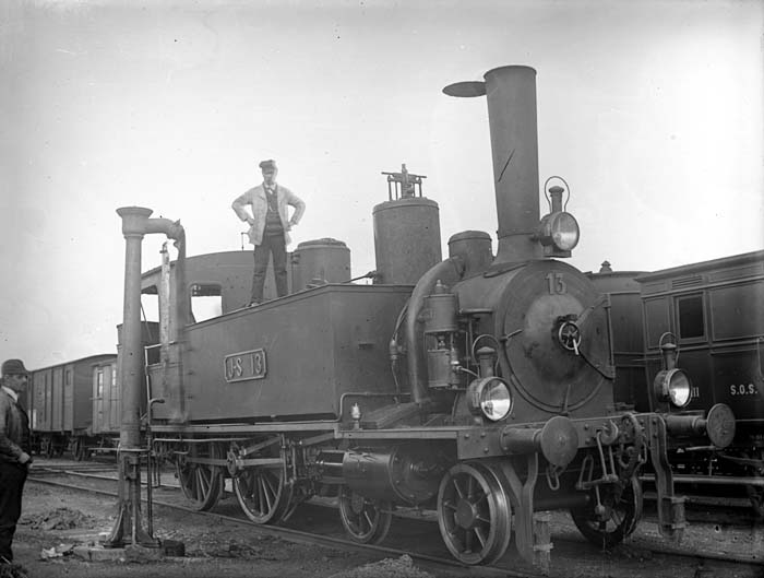 Eb 2/4 Nummer 13 der Jura–Simplon-Bahn an einem Wasserkran. Der Wagen im Hintergrund trägt noch die Beschriftung S.O.S. (Suisse-Occidentale–Simplon)